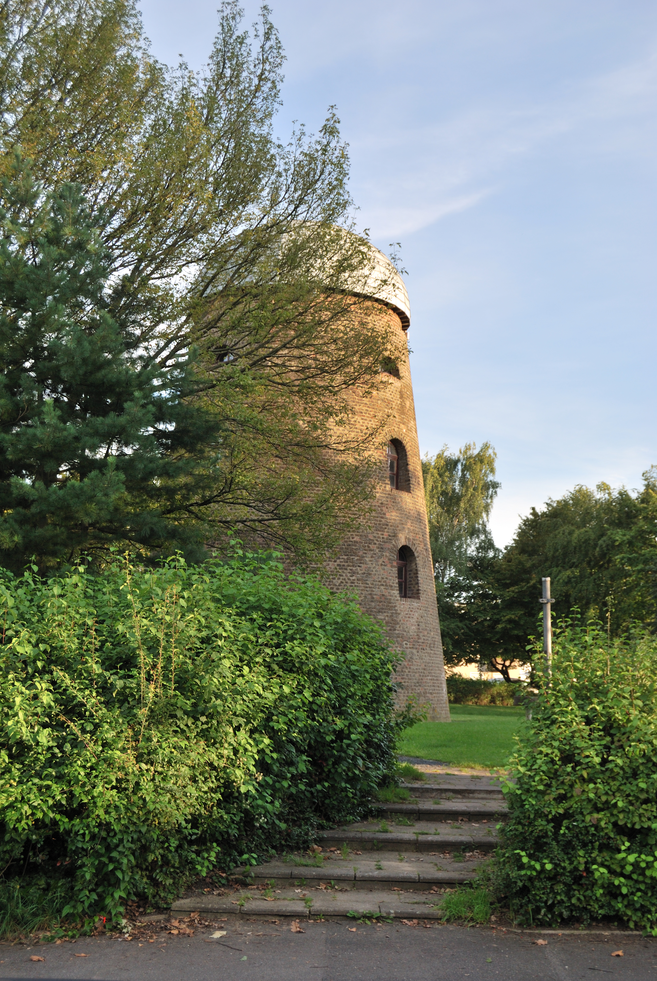 Denkmalnummer 17